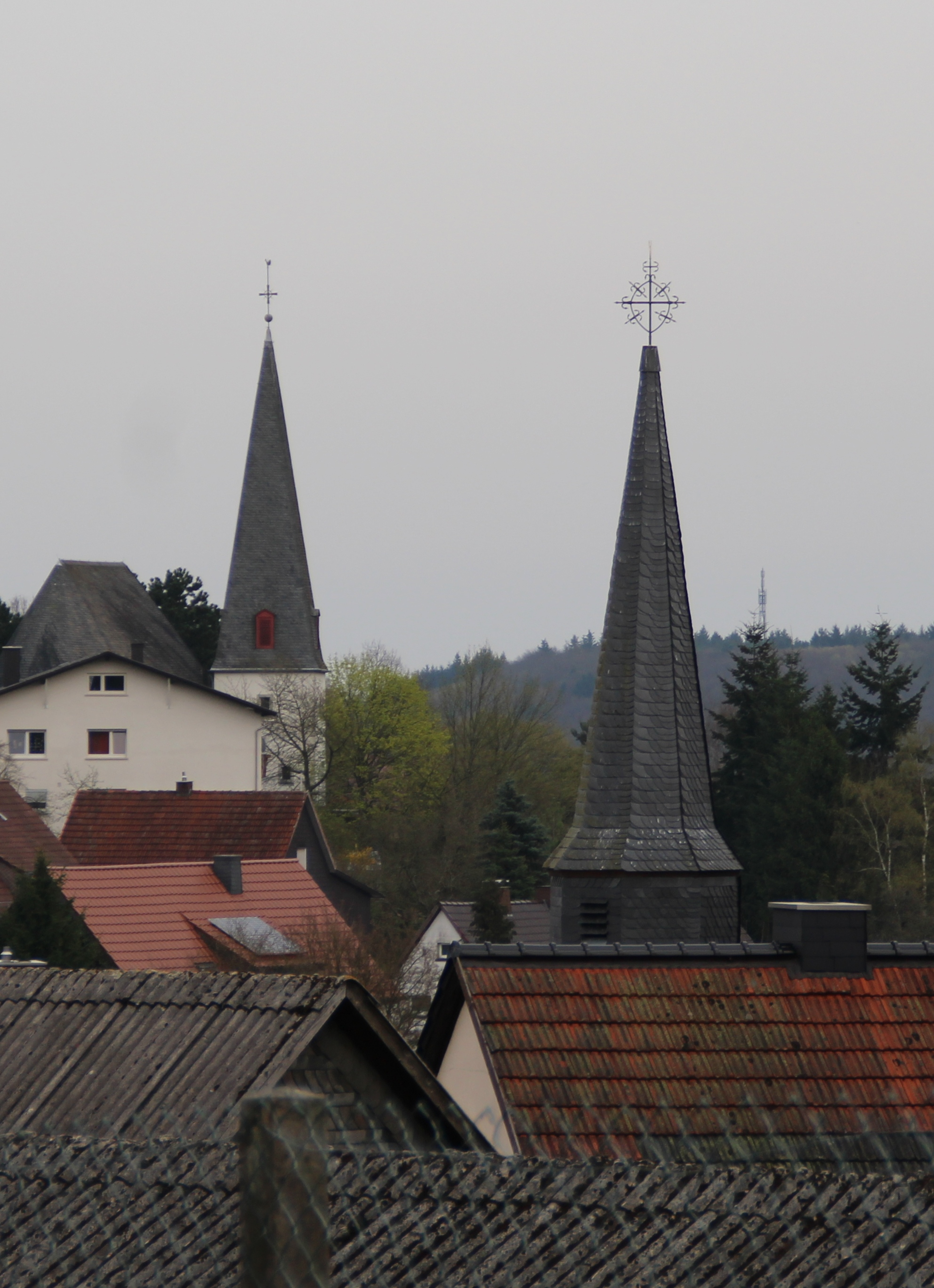 Türme der alten (rechts) und neuen (links) Ev. Kirche